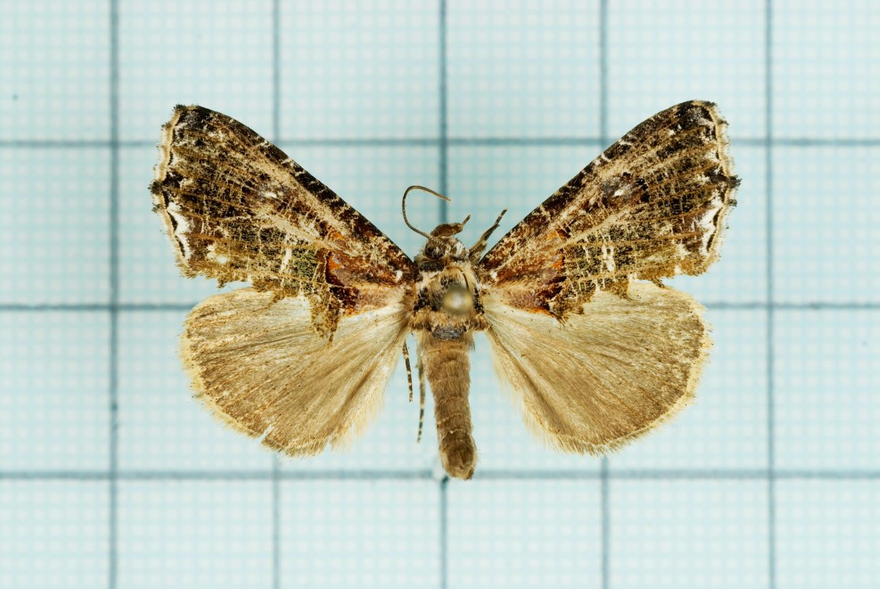 Pilipectus taiwanus Wileman, 1915 台灣穗夜蛾 鞍1:P.66,Pl.16-8